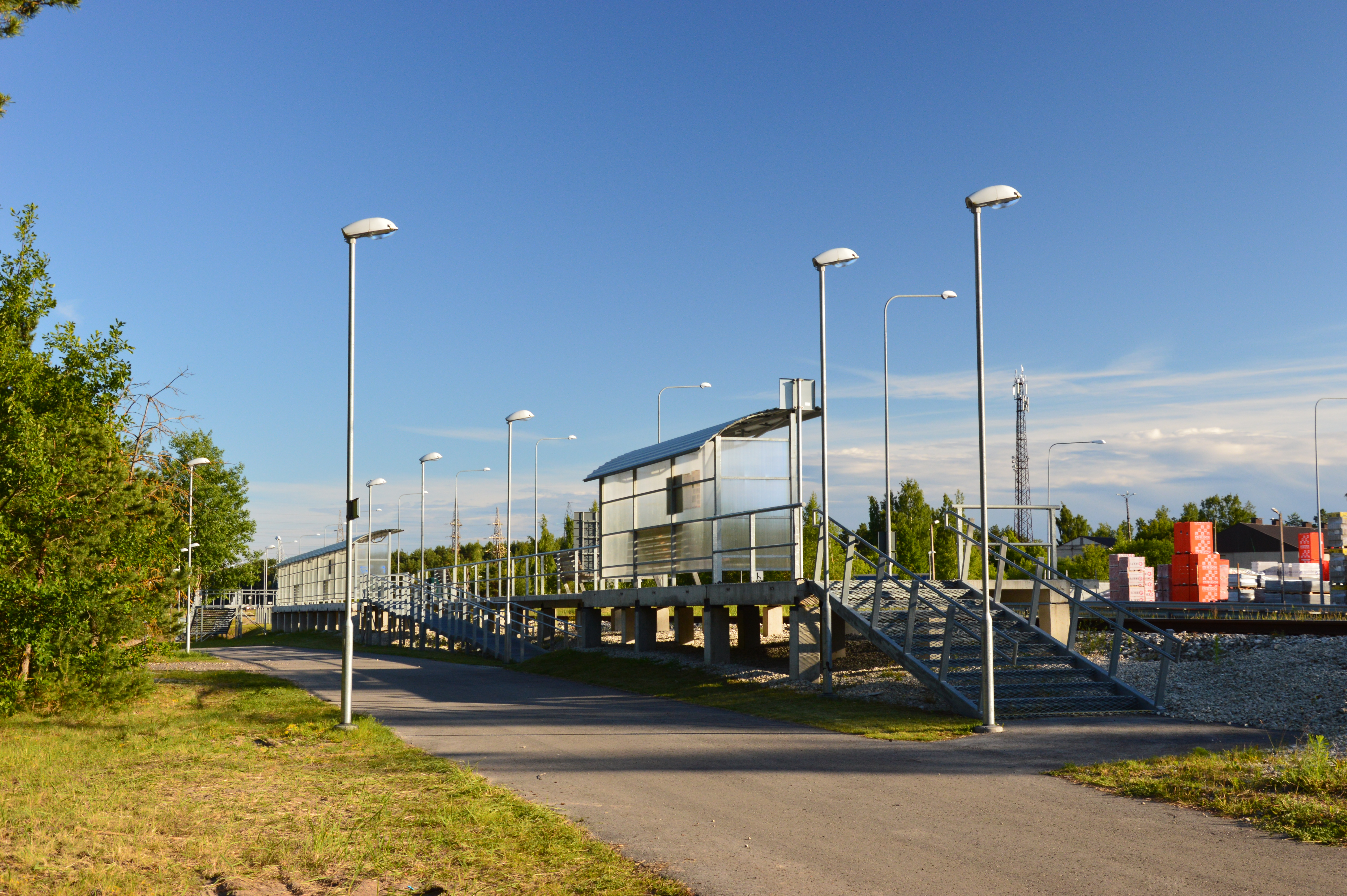 Pärnu raudteepeatus